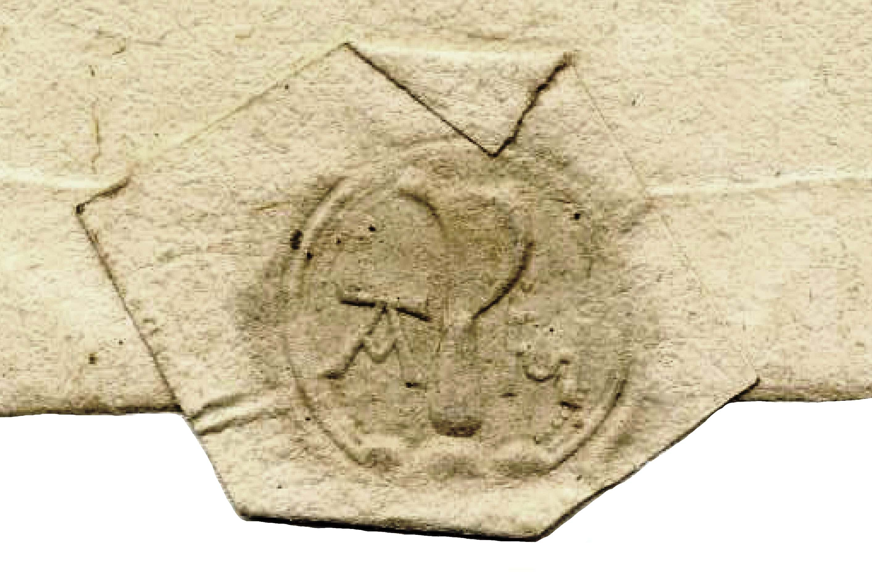 Sichel in der Mitte, links A (Andreas), rechts H (Hoffrichter). Die Sichel steht auf einem Dreiberg. Der Siegel ist einigen Briefen abgehangen, so auch STA. Wertheim, LW Gem A, Rep 45 (Pfarrsachen) Nr. 22: Superintendur- und Pfarrbestellung zu Wertheim.